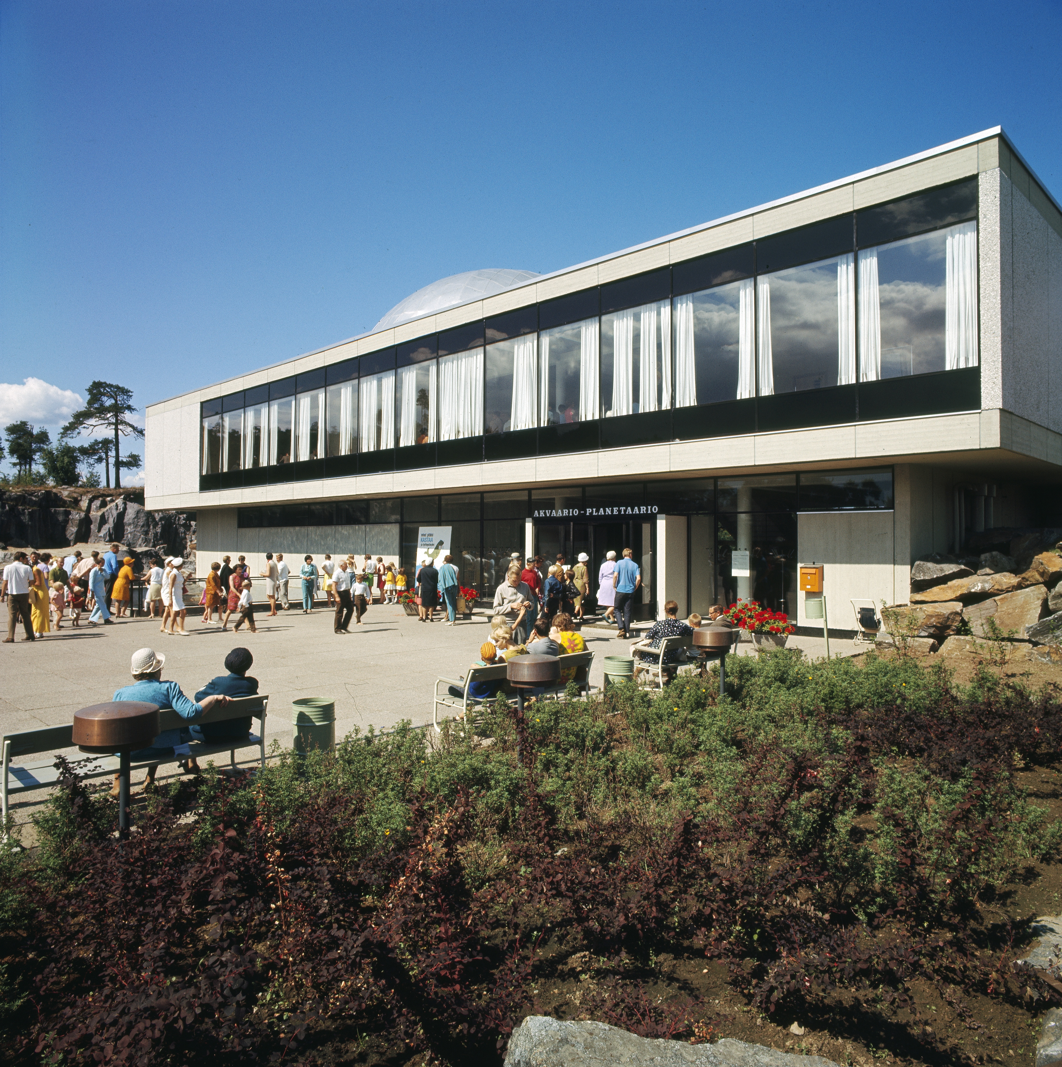 Kuvassa on akvaario-planetaarion eteläinen julkisivu alkuperäisessä asussa. Rakennuksen suunnitteli Arkkitehtitoimisto Pekka Ilveskoski, ja se valmistui Tampereen Särkänniemeen 1969. Myöhemmin talon yhteyteen tehtiin Näsinneulan näkötorni.